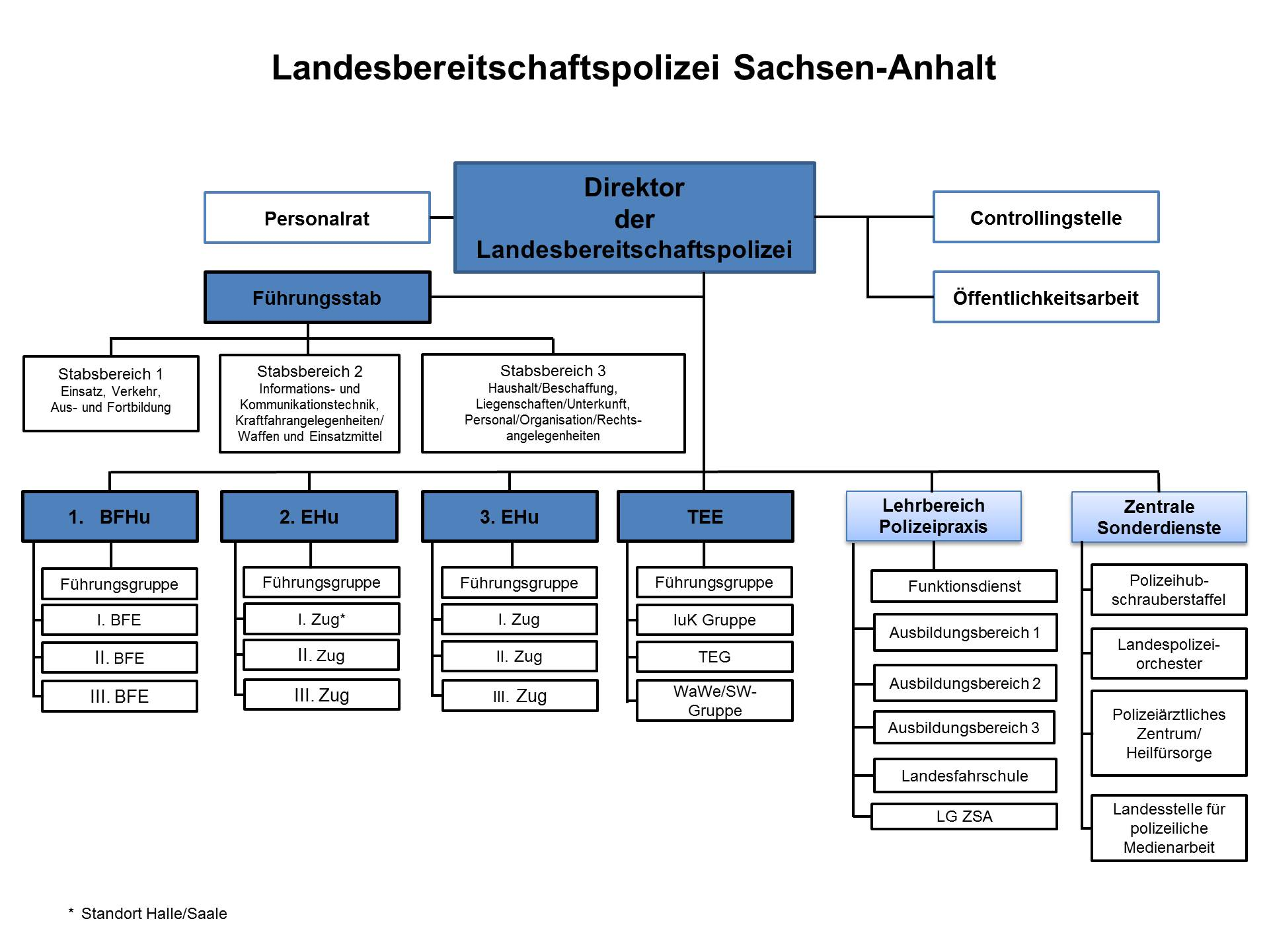 Das Organigramm (Vers. 2018) stellt die Struktur der Landesbereitschaftspolizei Sachsen-Anhalt dar. Diese dürfte sich mit Umsetzung der Strukturreform ab 2019 ändern.